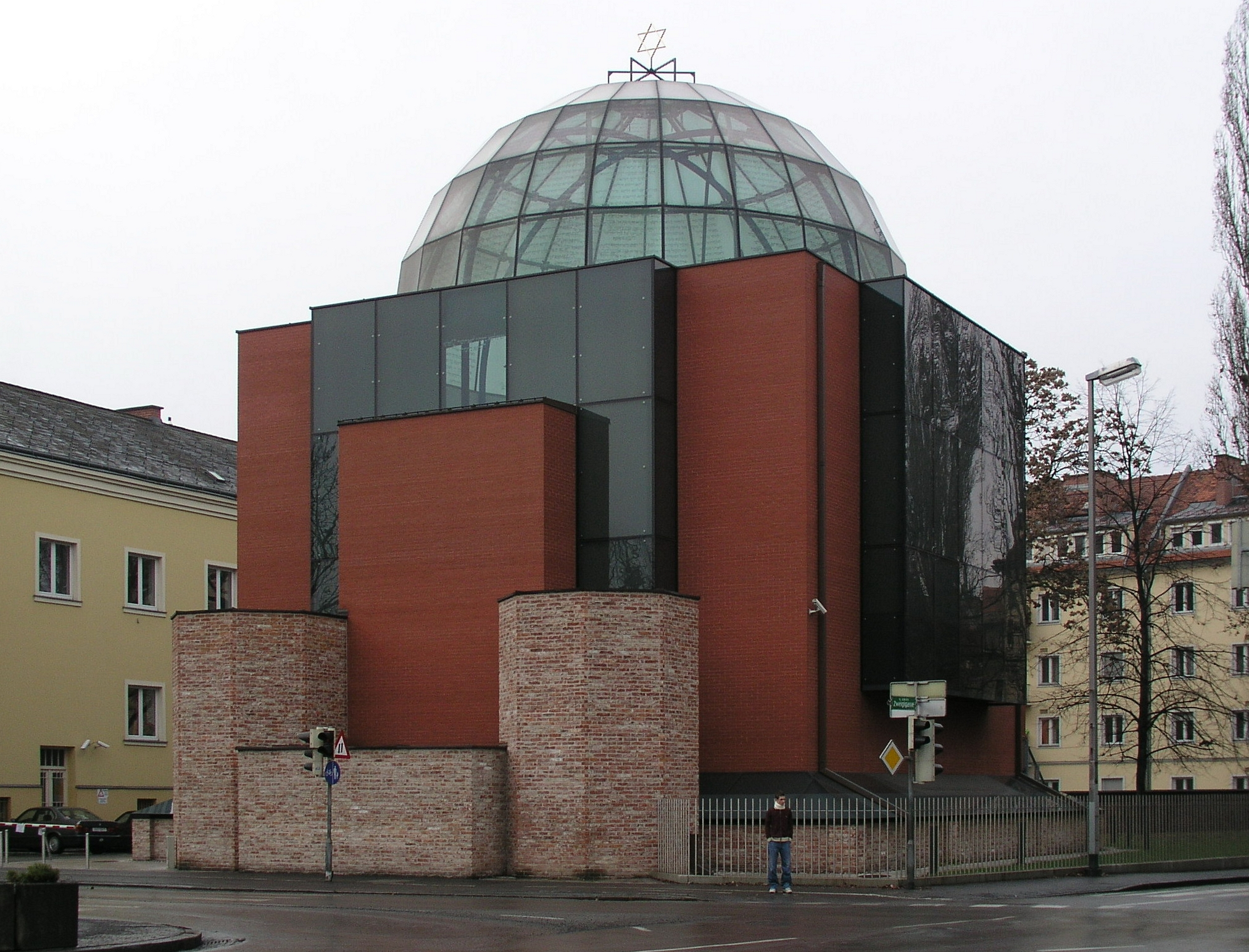 Grazer Synagoge - Außenansicht